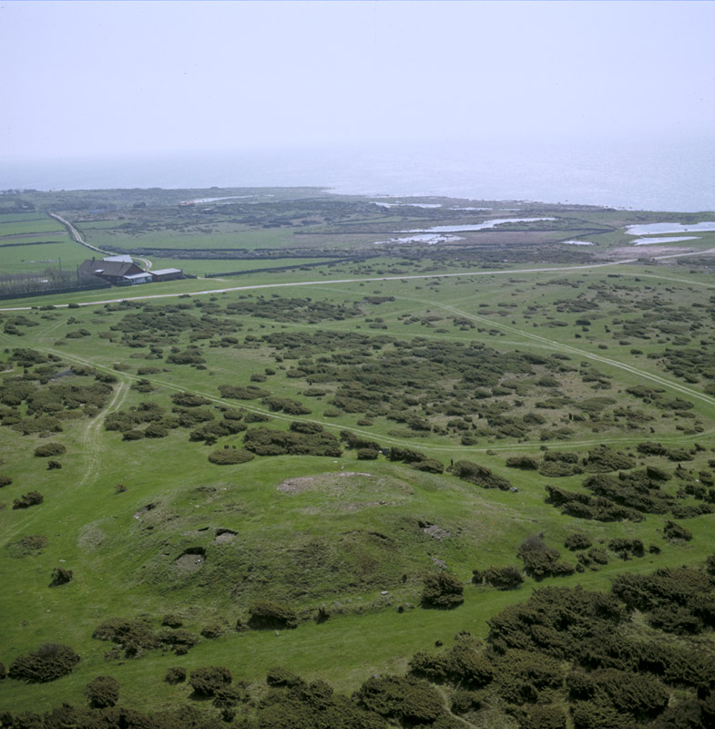 Gravhögen från nordväst, i bildens nederkant, Raä-nr Västra Karup 136:1, ingår i Bjärekustens naturreservat. Motiv: Västra Karup 136:1 Nyckelord: Flygbilder, Naturreservat Kategori: Kust- och skärgårdsmiljö, Hög Gravhögen från nordväst, i bildens nederkant, Raä-nr Västra Karup 136:1, ingår i Bjärekustens naturreservat. Västra Karup 136:1.